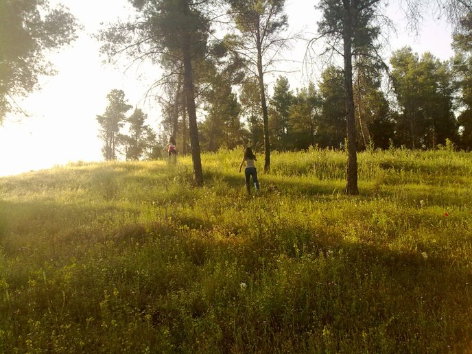 Unas niñas corriendo por el paraje de "Los Pinares", en el municipio de Láchar (Granada, España). Recorte de una foto hecha por mí.